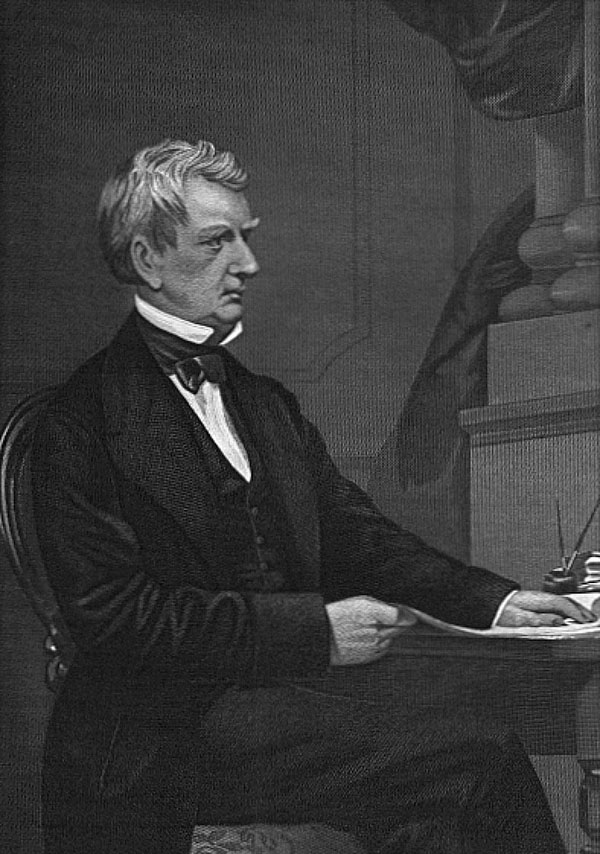 William Henry Seward